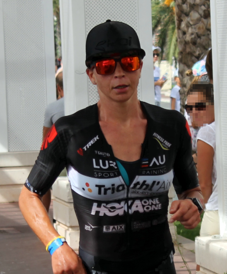 Manon Genet Ironman 70.3 Nice 2018